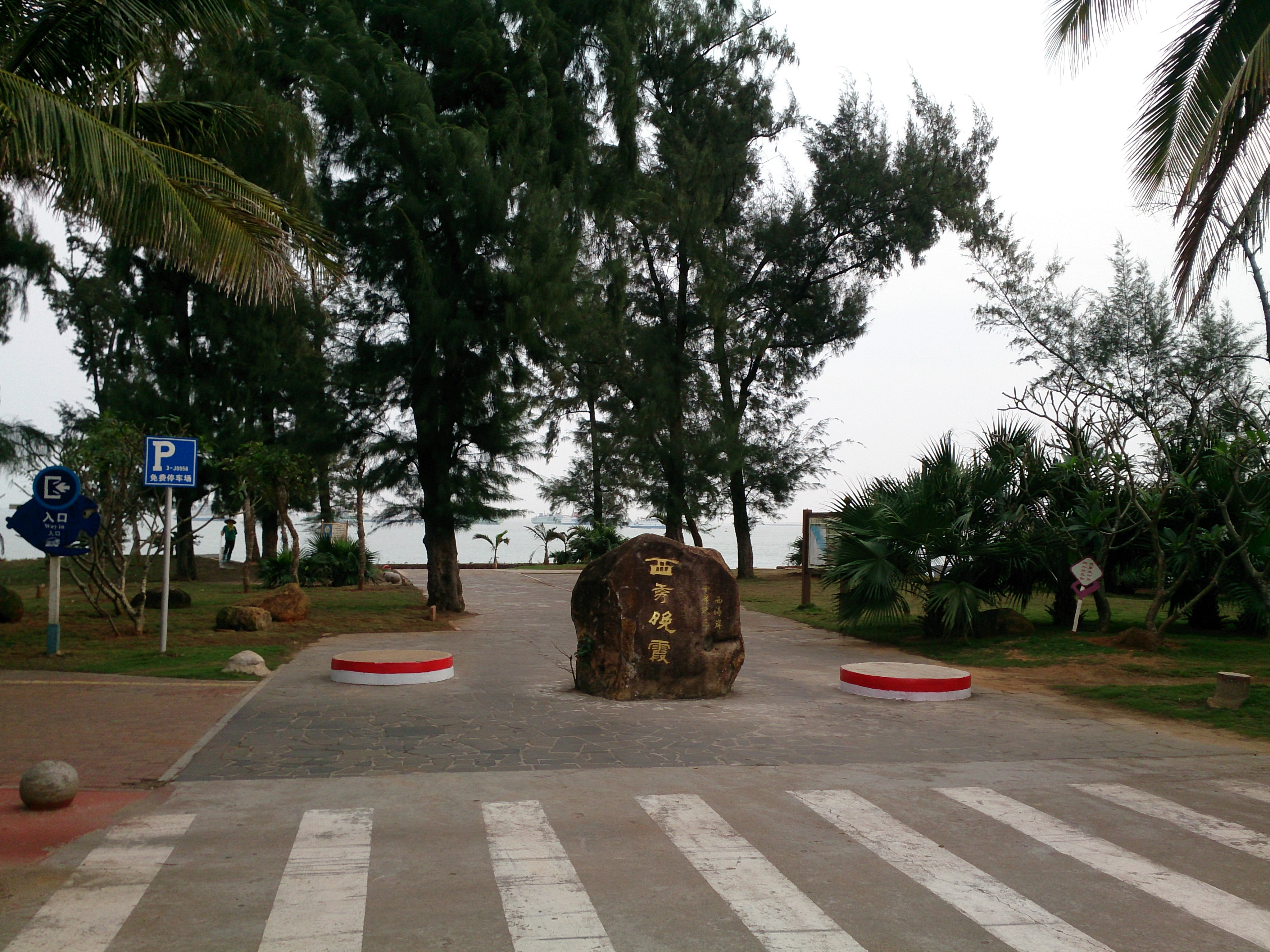 西秀海滩 - Xixiu Beach - 2016.01